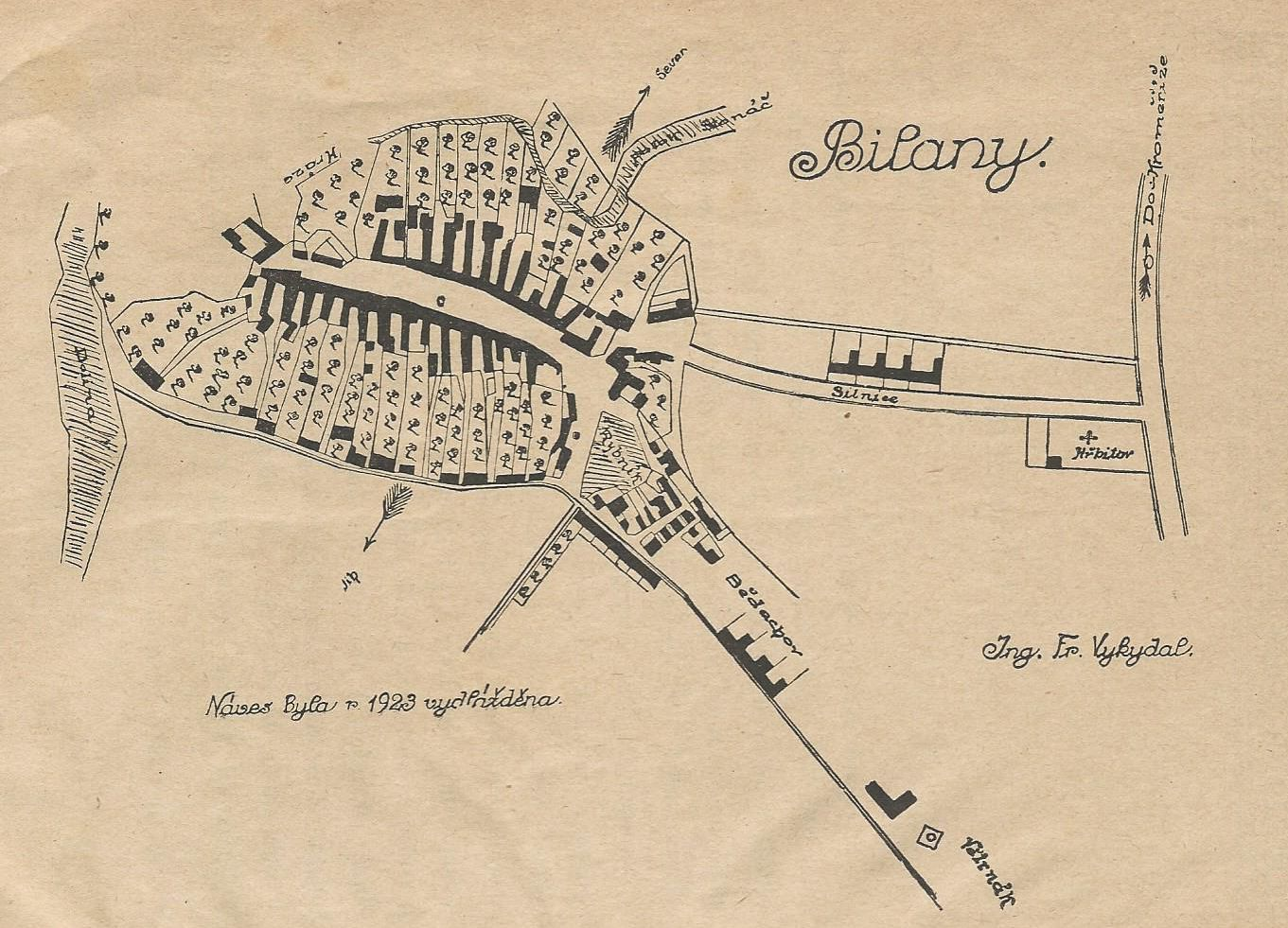 Plán (skica) obce Bílany reprodukovaný v knize Dějiny Obce Bilan (1924). Plán vyhotovil František Vykydal, dlouholetý kronikář obce.